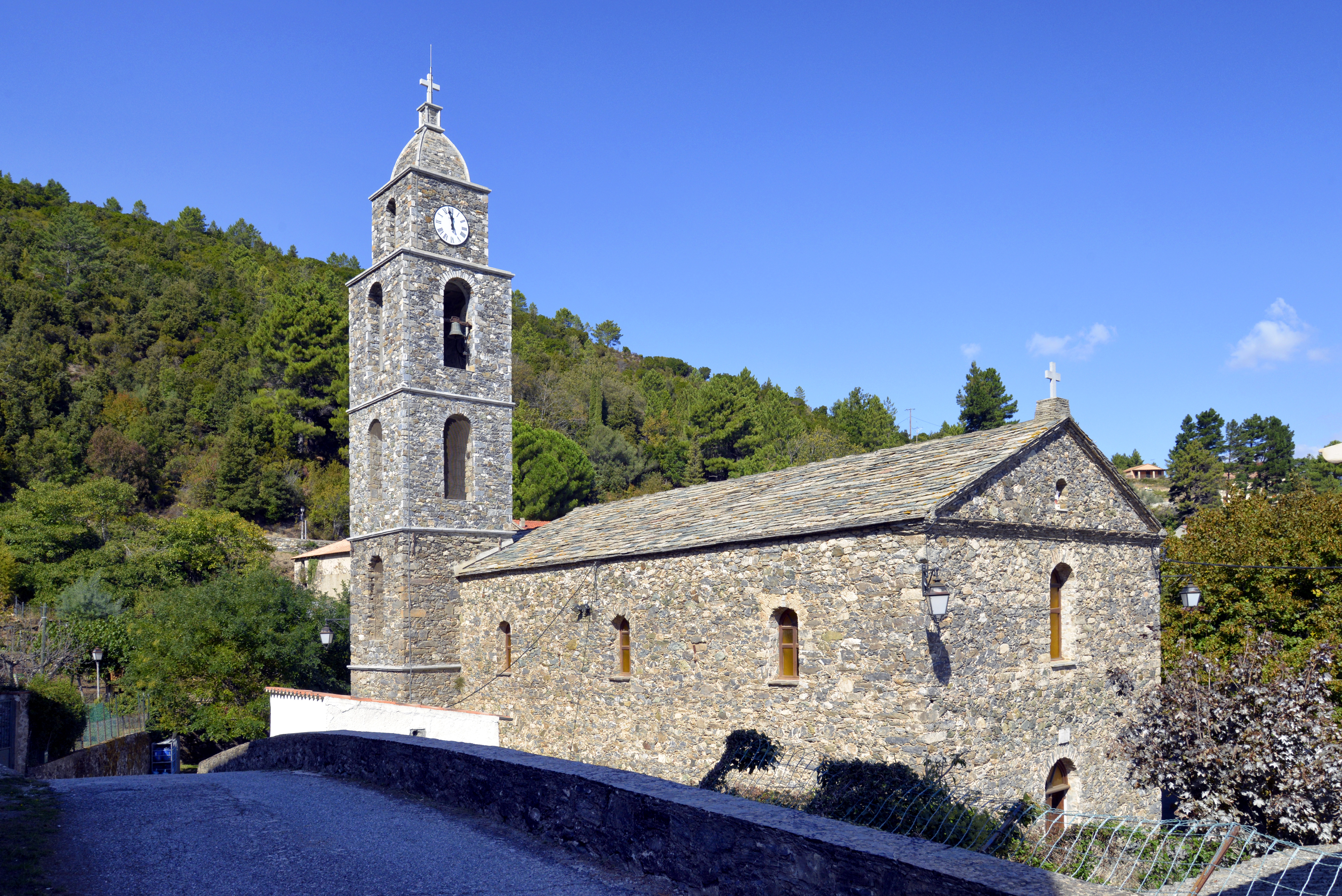 Rospigliani, Centre Corse (Haute-Corse) - L'église paroissiale Saint-Martin de Tours, construite en 1896. Le clocher actuel a été réalisé au cours du XXe siècle. Au début du siècle présent, l'enduit des façades a été déposé pour faire apparaître les moellons de pierres.